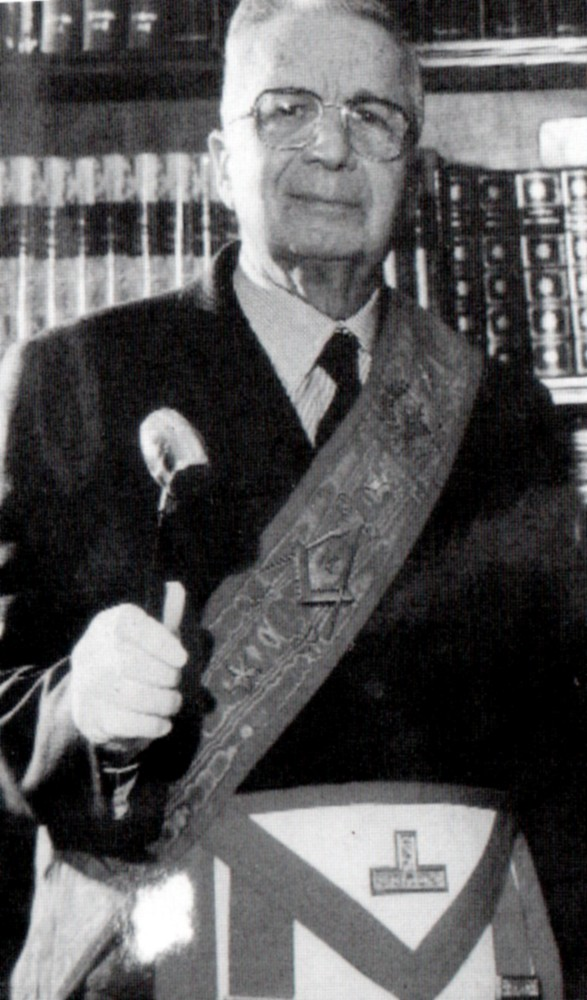 Licio Gelli in paramenti massonici